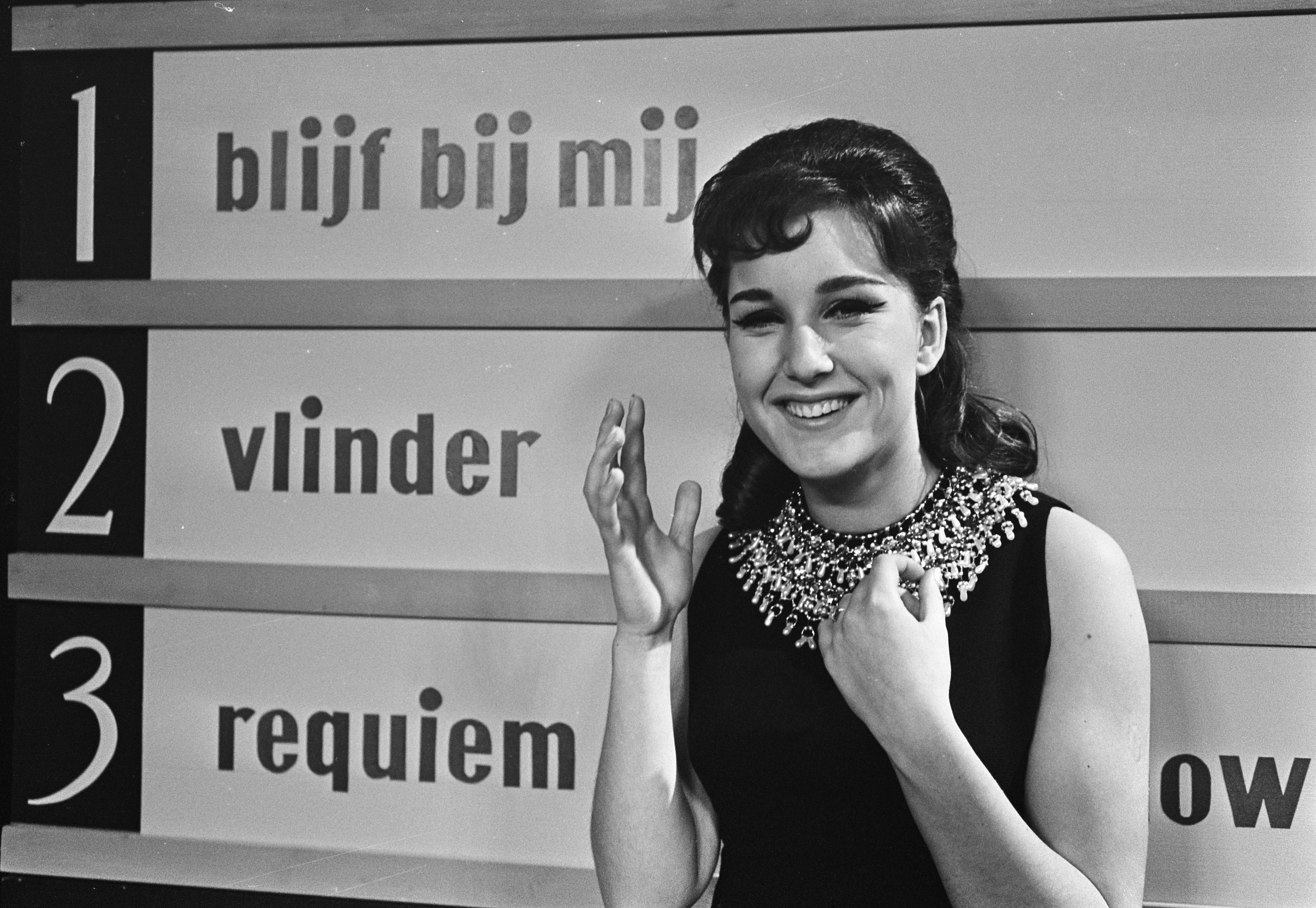 Collectie / Archief : Fotocollectie Anefo Reportage / Serie : [ onbekend ] Beschrijving : Voorronde finale Nationaal Songfestival 1965, Shirley Zwerus Datum : 12 februari 1965 Trefwoorden : artiesten, muziek, songfestivals, zangeressen Persoonsnaam : Zwerus Shirley Instellingsnaam : Nationaal Songfestival Fotograaf : Koch, Eric / Anefo Auteursrechthebbende : Nationaal Archief Materiaalsoort : Negatief (zwart/wit) Nummer archiefinventaris : bekijk toegang 2.24.01.05 Bestanddeelnummer : 917-4246